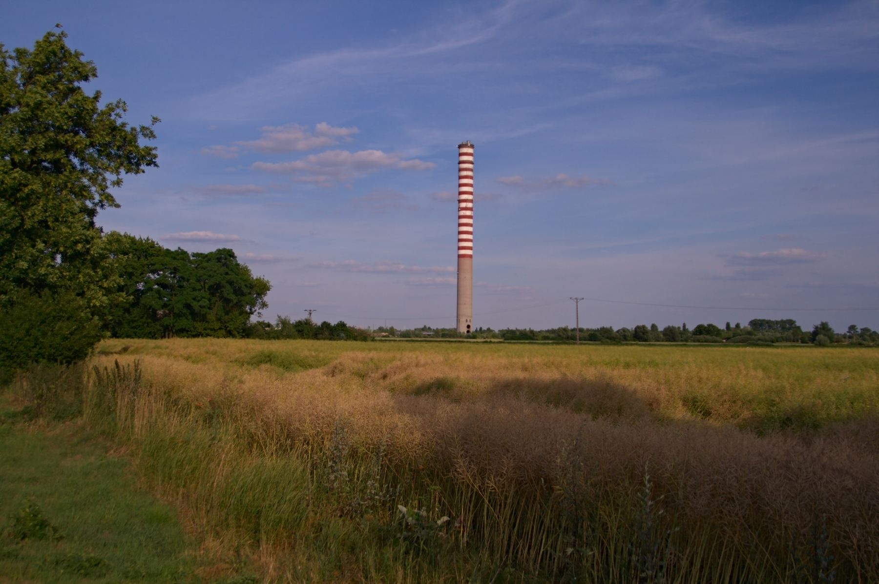 Komin Elektrociepłowni widziany z Mosznej